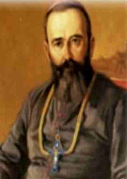 Dionis Nyaradi, 1874-1940, Bischof von Križevci (1920-1940), Apostolischer Administrator von Prešov (1922-1927)